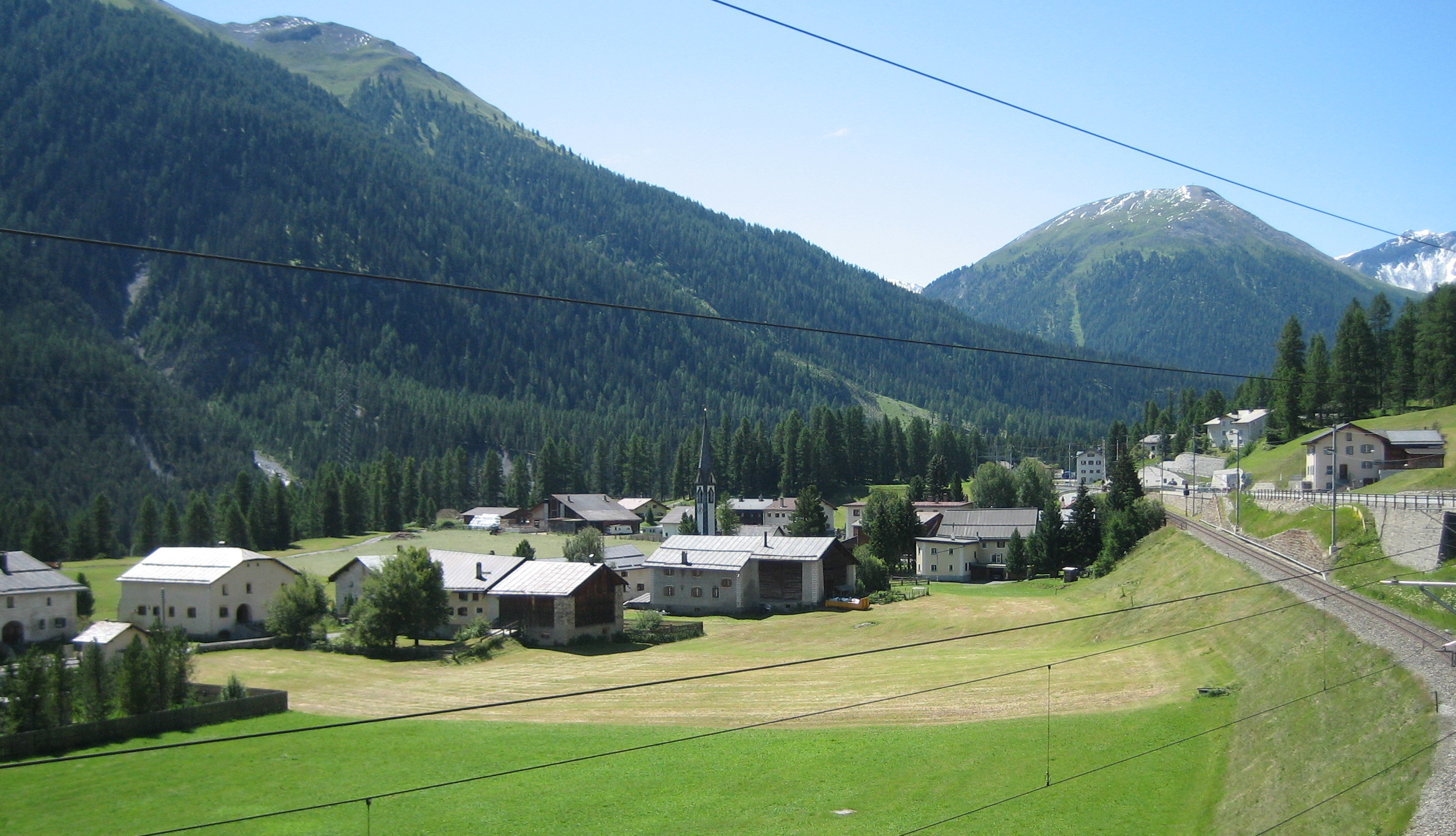 Cinuos-chel im Eingadin